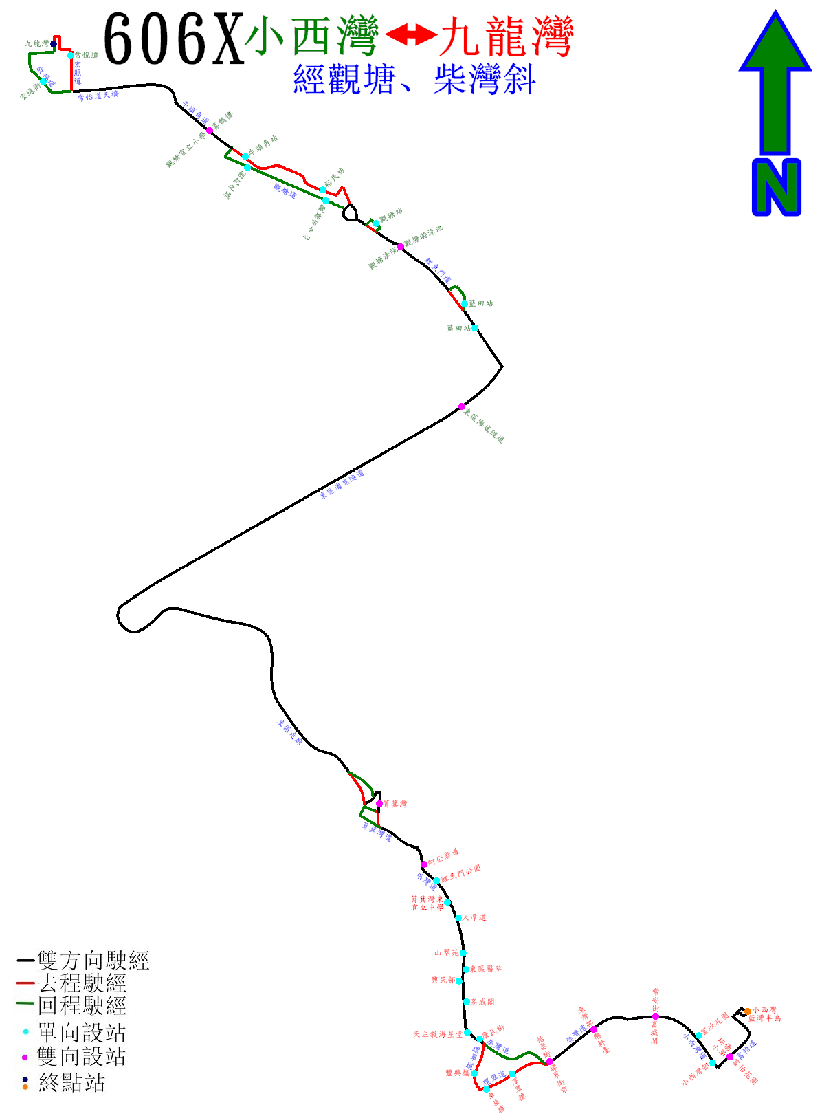 中文（香港）: 過海隧巴606X線的走線圖